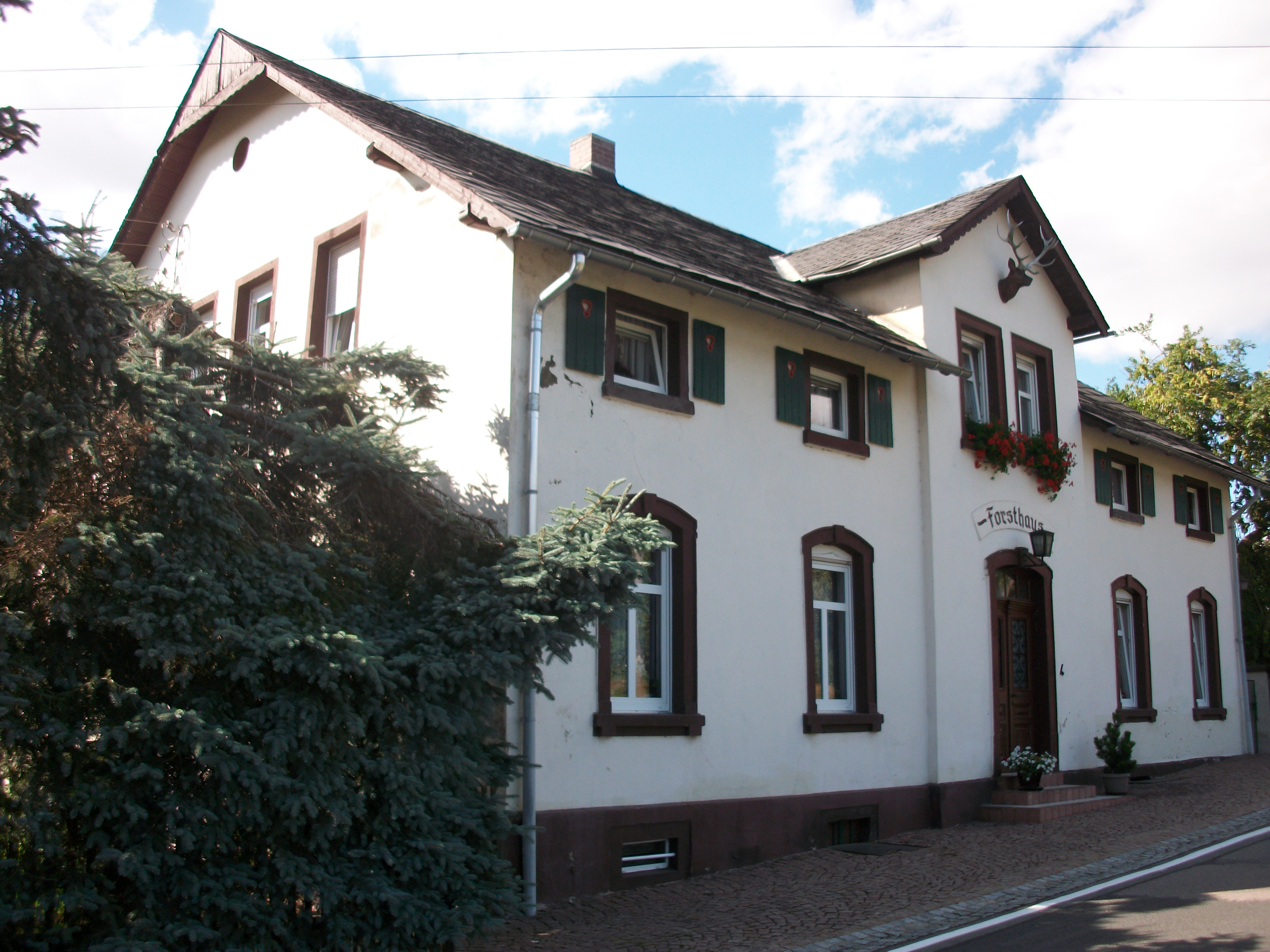 Frankenau, Königshainer Straße 4